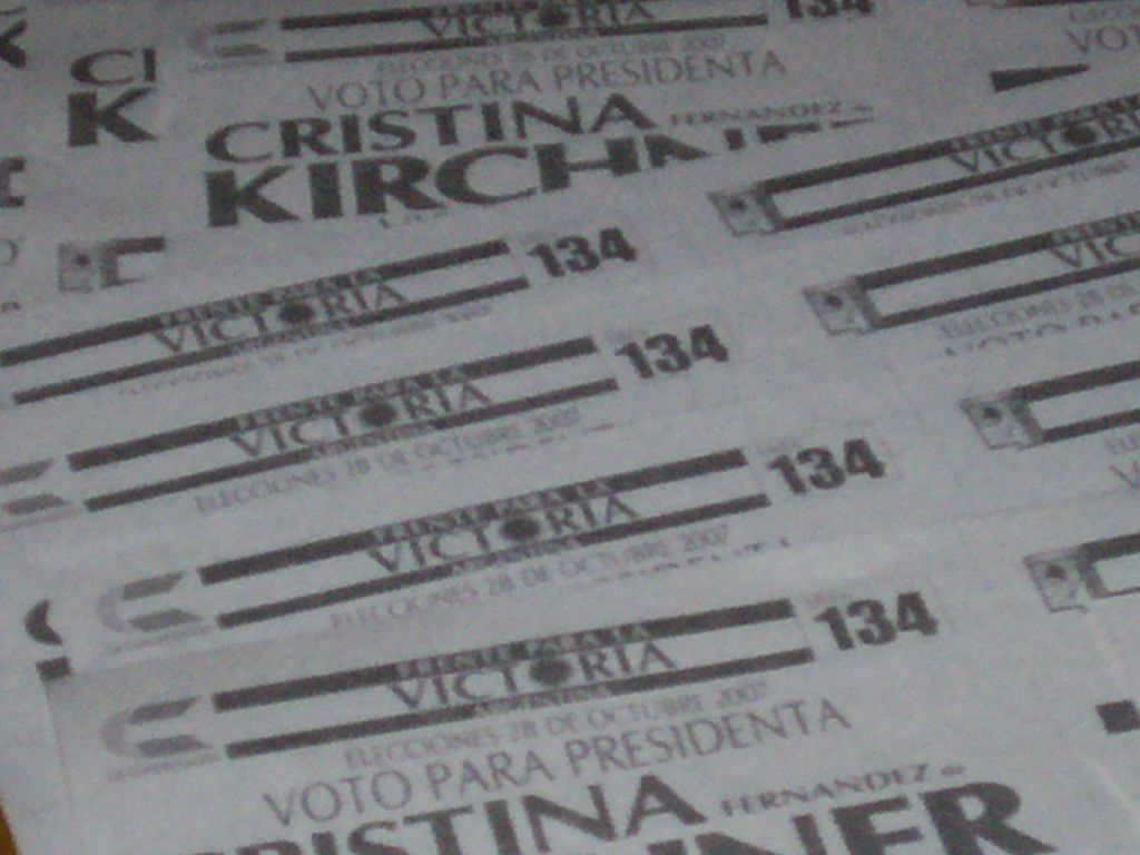 Boletas del Frente para la Victoria